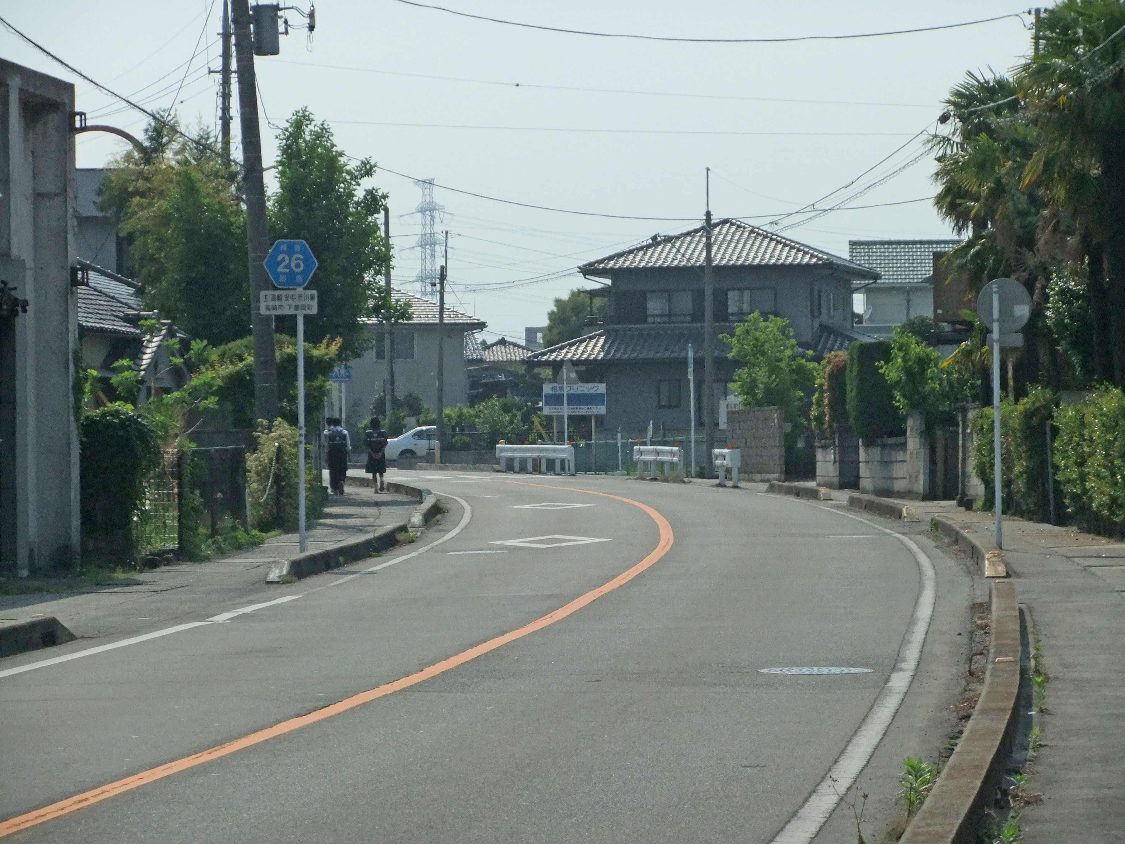 群馬県道26号の起点付近、高崎市下豊岡町で撮影。